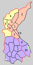 群馬県山田郡の町村。